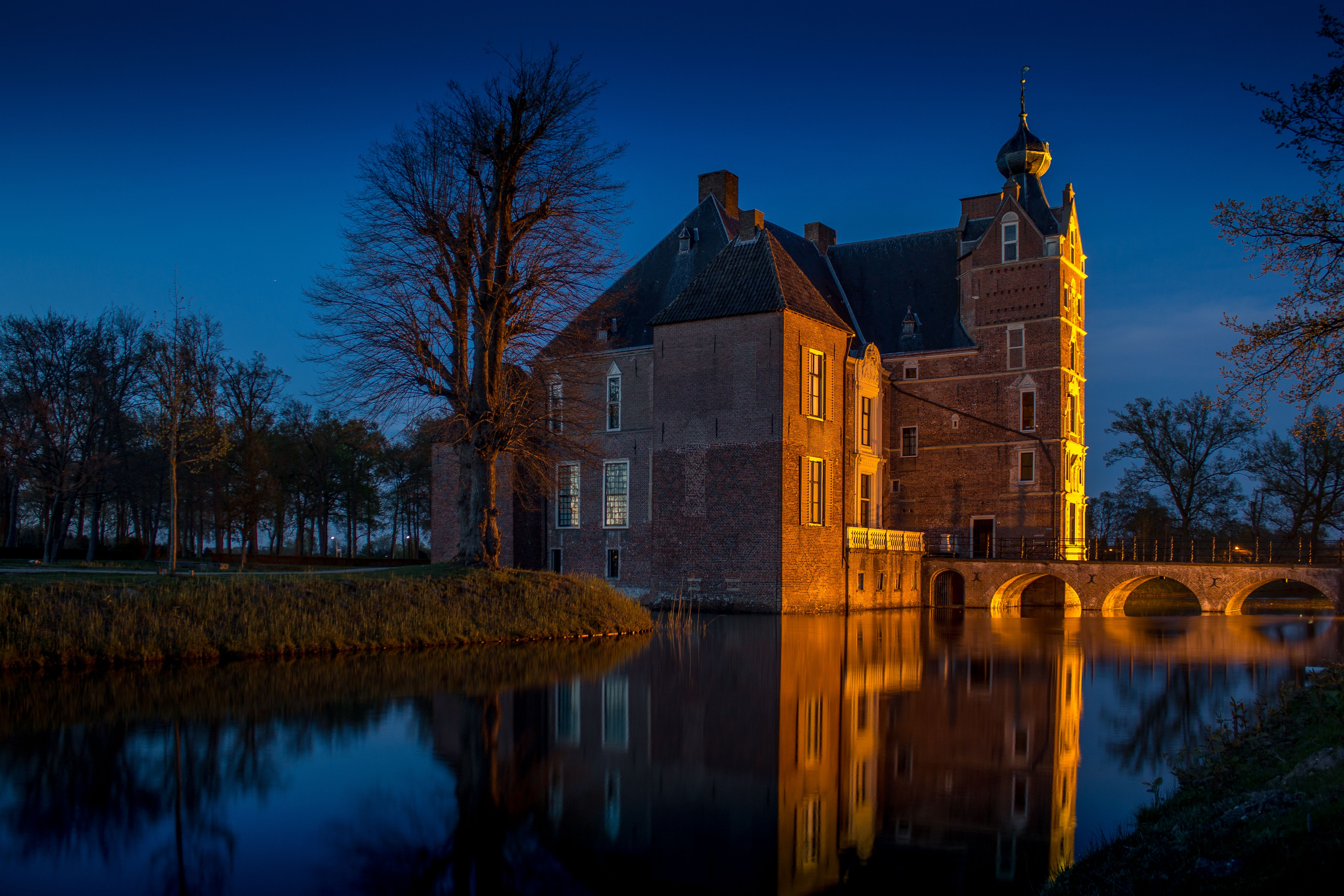 Castle De Cannenburgh in Vaassen